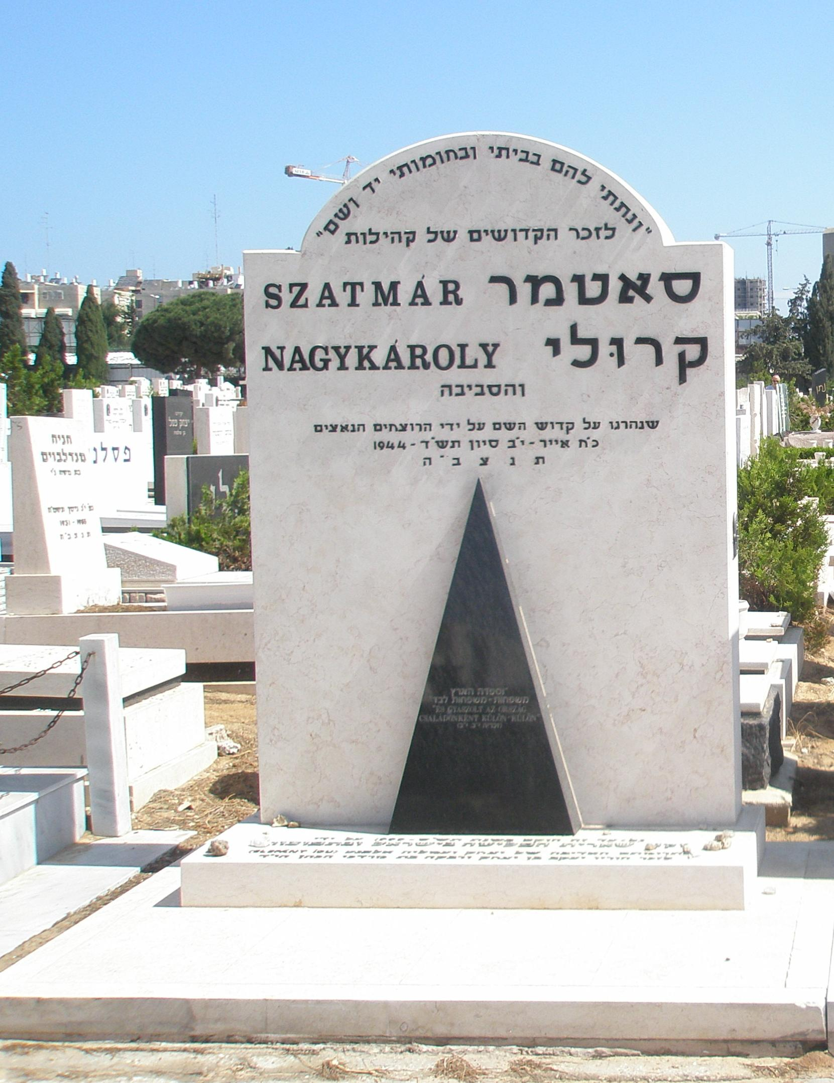 Szatmar Nagykaroly memorial at Holon Cemetery